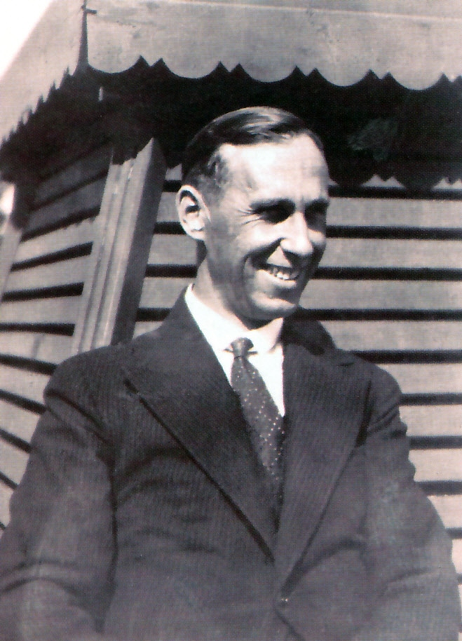 Gustáv Nedobrý bol významný slovenský turistický a športový činovník, ktorý pôsobil v Klube československých turistov a v Klube slovenských turistov a lyžiarov Vo vysokých tatrách, bol zakladateľ horolezeckého klubu JAMES, majiteľ chata pri Jamskom plese